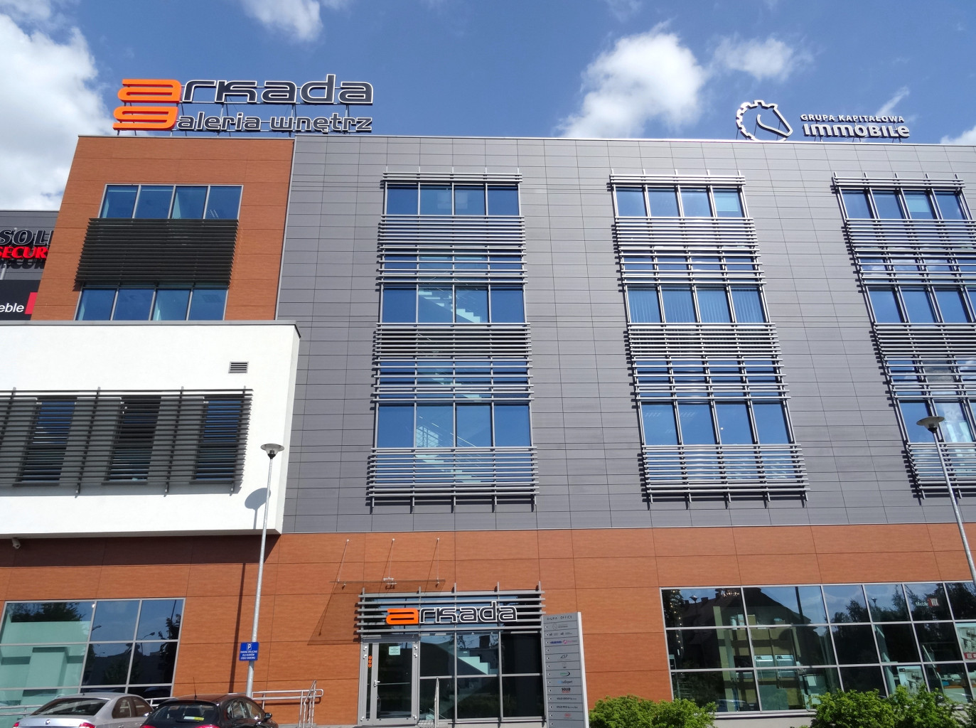 Galeria wnętrz Arkada przy ul. Fordońskiej w Bydgoszczy